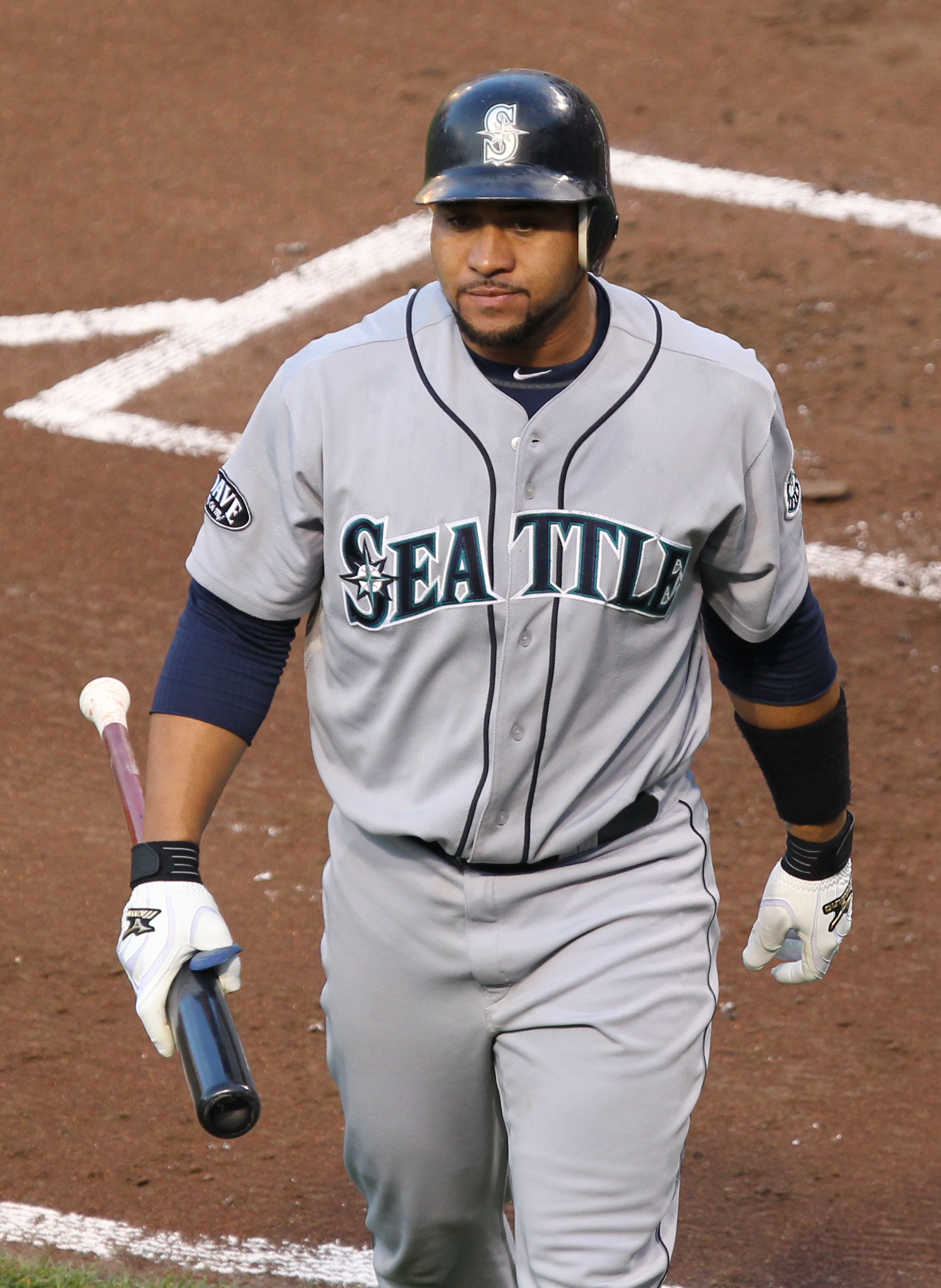 Miguel Olivo